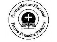 Logo von Pfarramt der reformierten Kirche Tamins